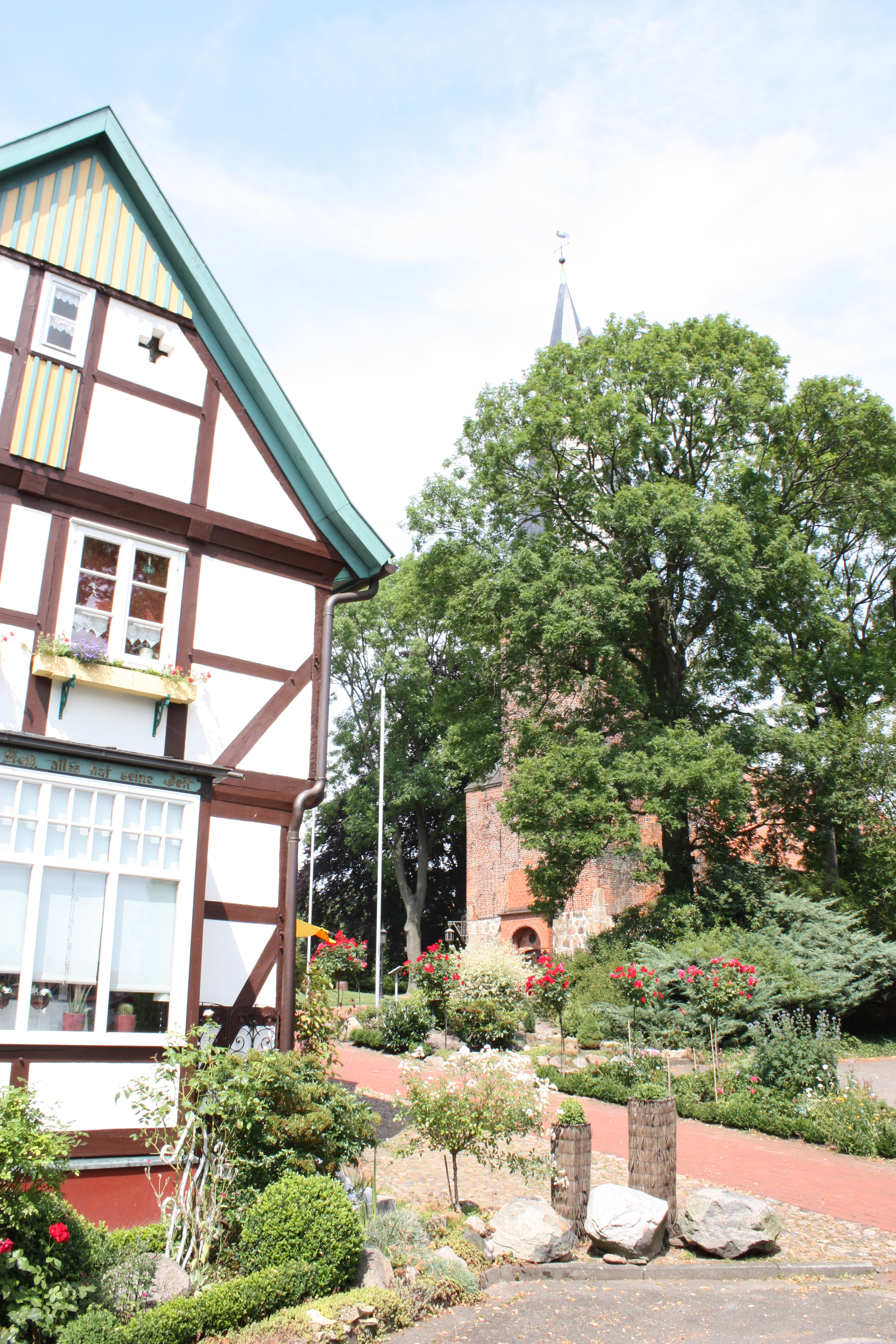 Barnstorf, Landkreis Diepholz, Niedersachsen